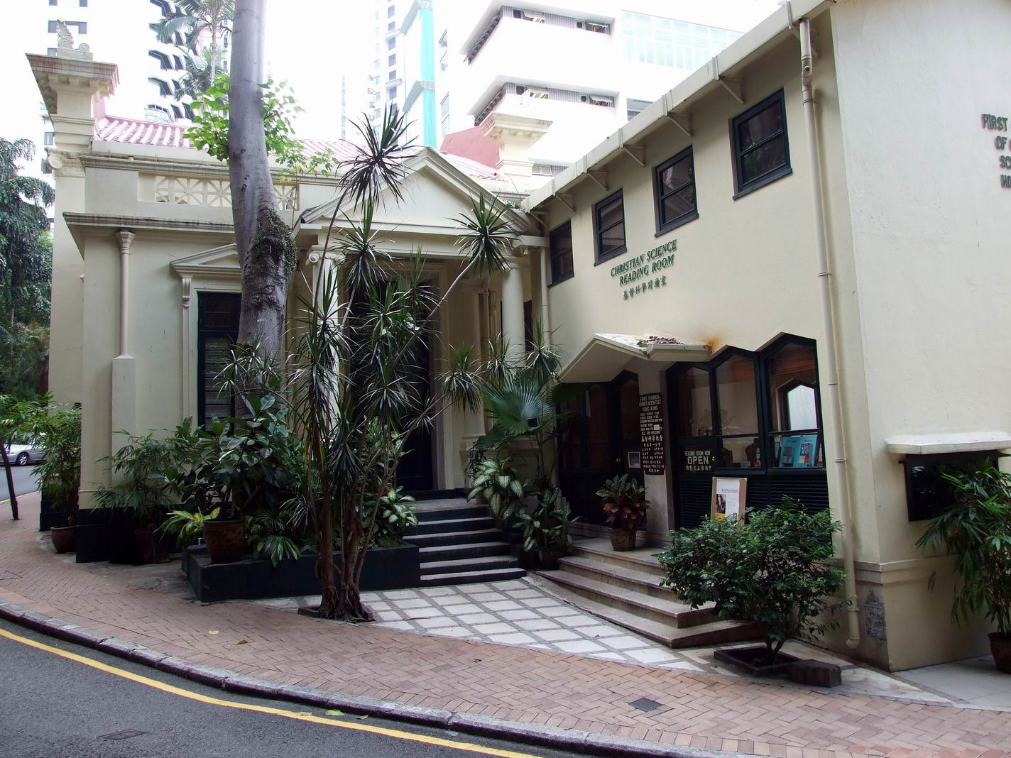 基督科學教會香港第一分會入口